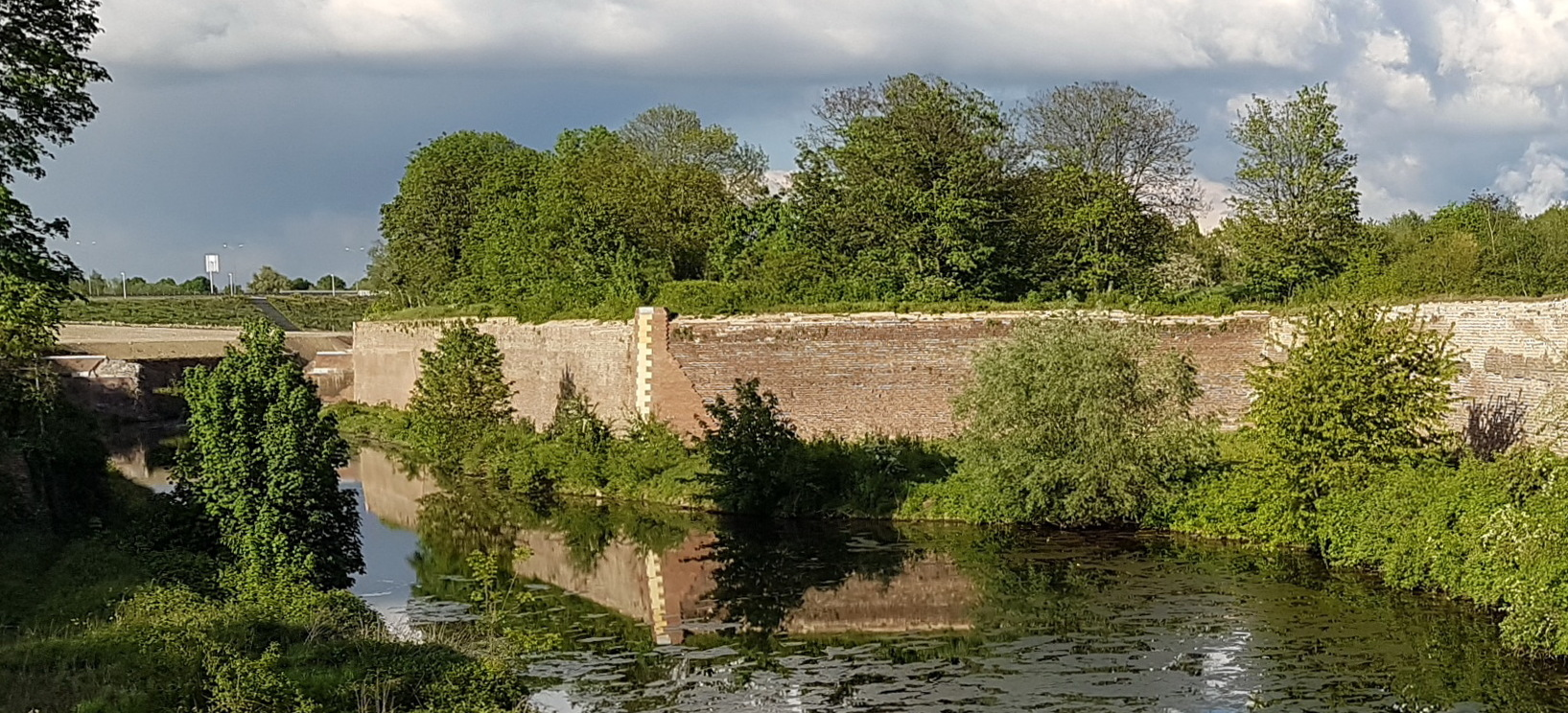 Zicht op de Havenkom en bastion B in de Nieuwe Bossche Fronten nabij de Cabergerweg in Maastricht.